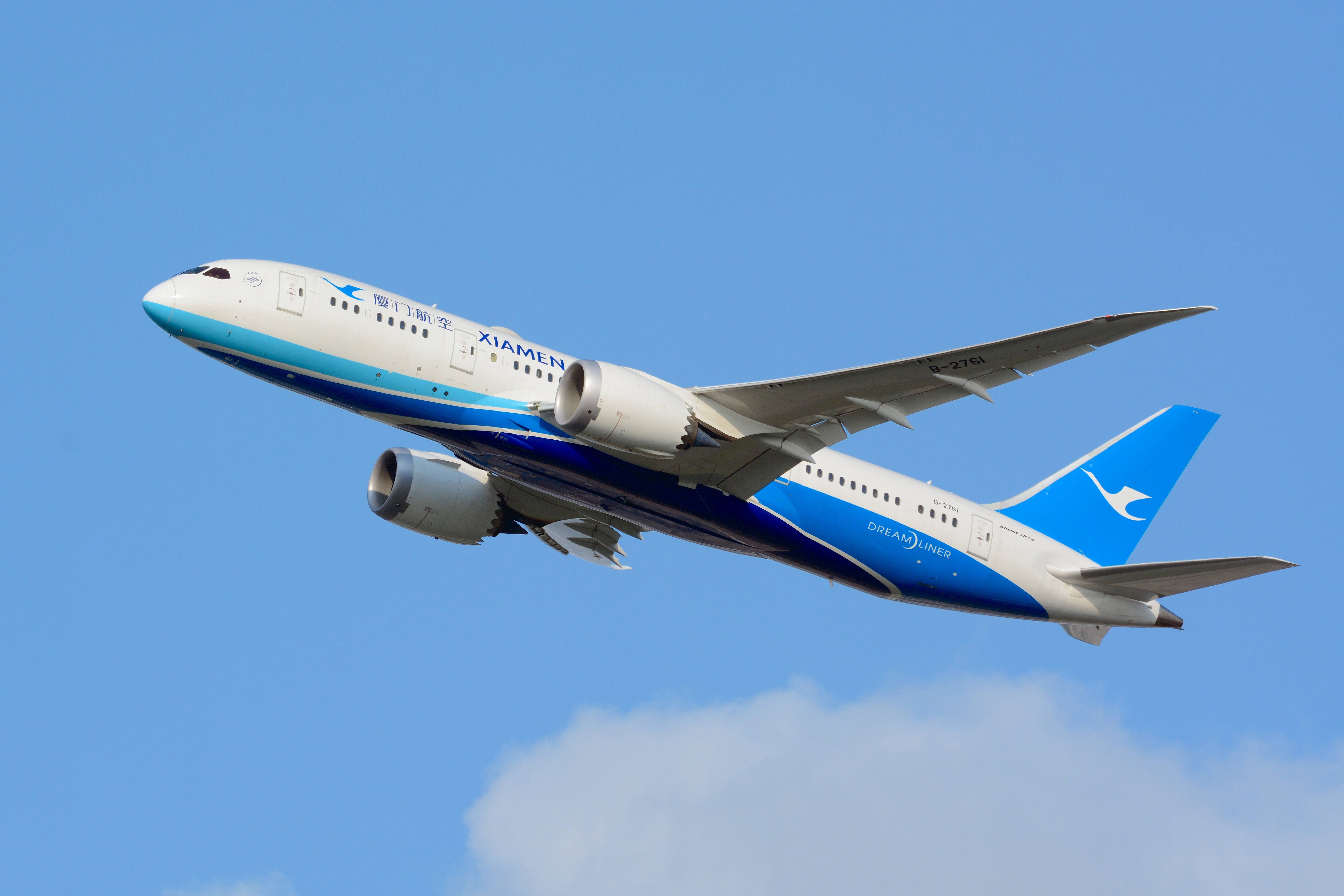 Xiamen Airlines, Boeing 787-8 B-2761 NRT